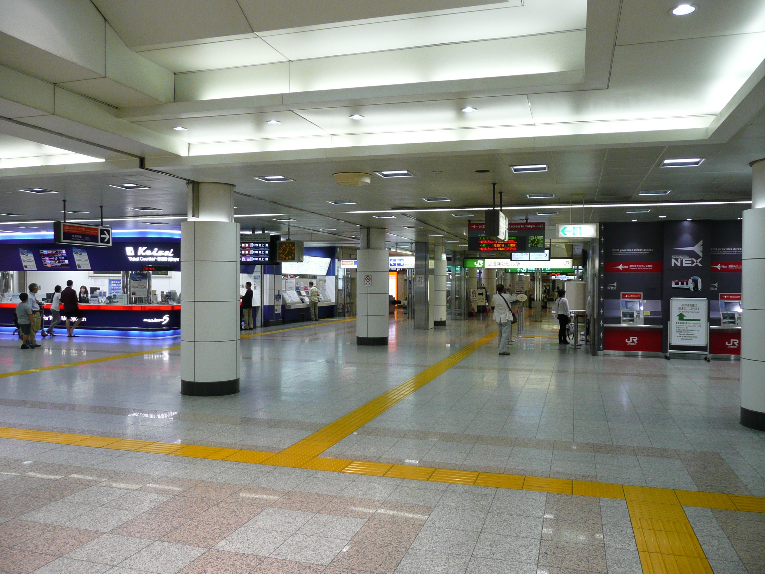 空港第2ビル駅